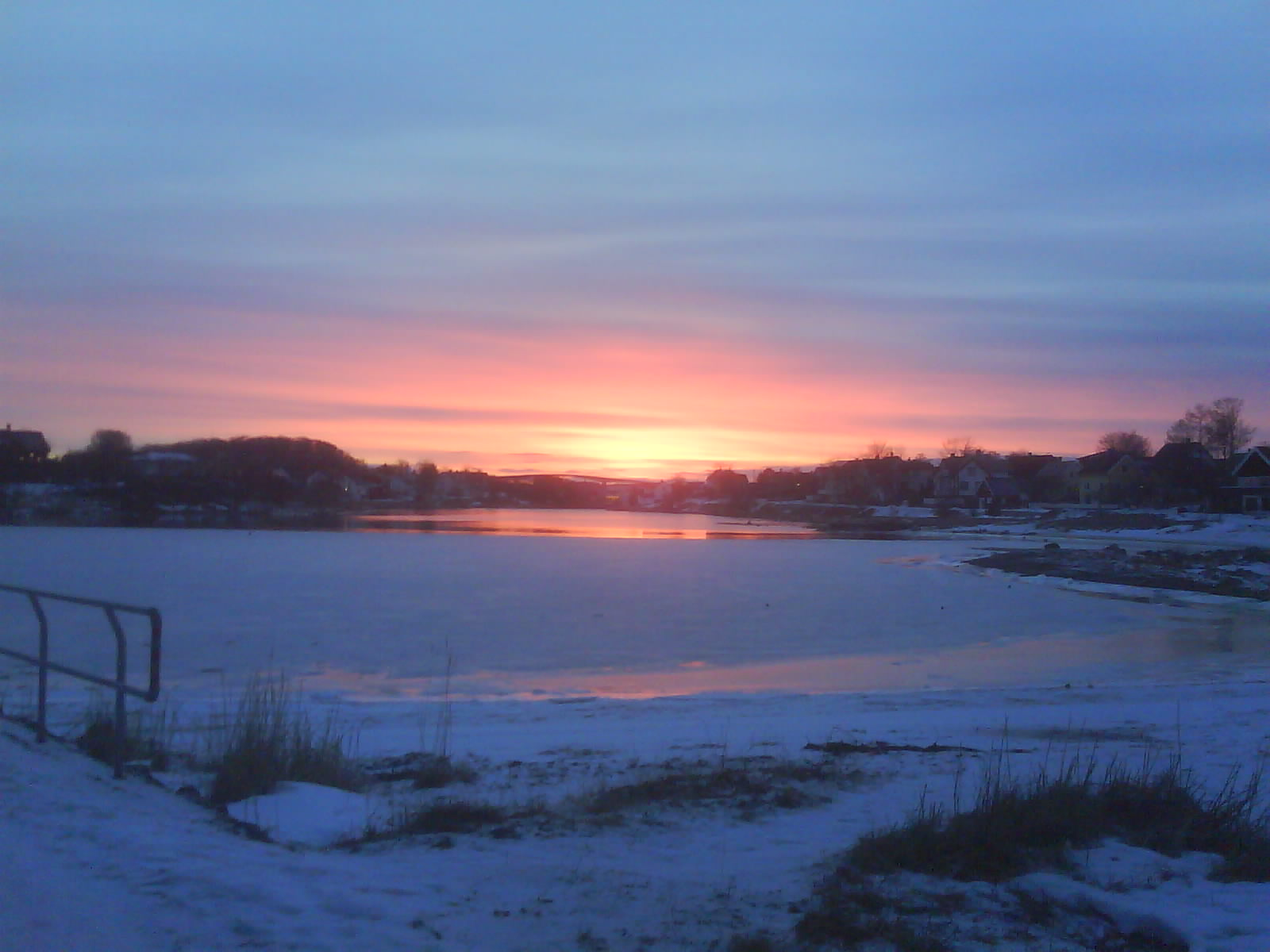 The Frøkenosen semi-saline lake in Brønnøysund, Norway